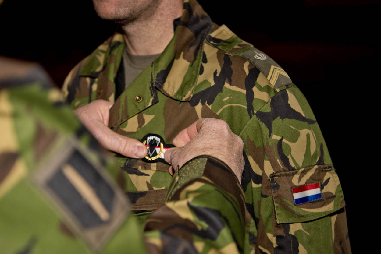 In het donker met een zuurstofmasker op van 8.000 meter hoogte uit een vliegtuig springen. Na de landing ongezien een gebied in Mali binnengaan, daar informatie verzamelen en veilig terugkeren. Hiervoor werden vandaag 32 commando’s beloond met de operationele wing. Dat gebeurde op de Engelbrecht van Nassaukazerne in Roosendaal. De operationele wing wordt uitgereikt.